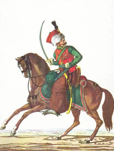 Mamelouk de la Garde impériale.